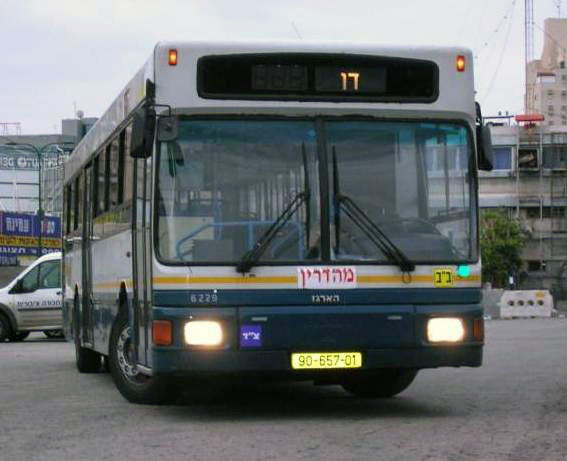 Bus labeled “mehadrin” (i.e. gender segregated), Israel, 2006